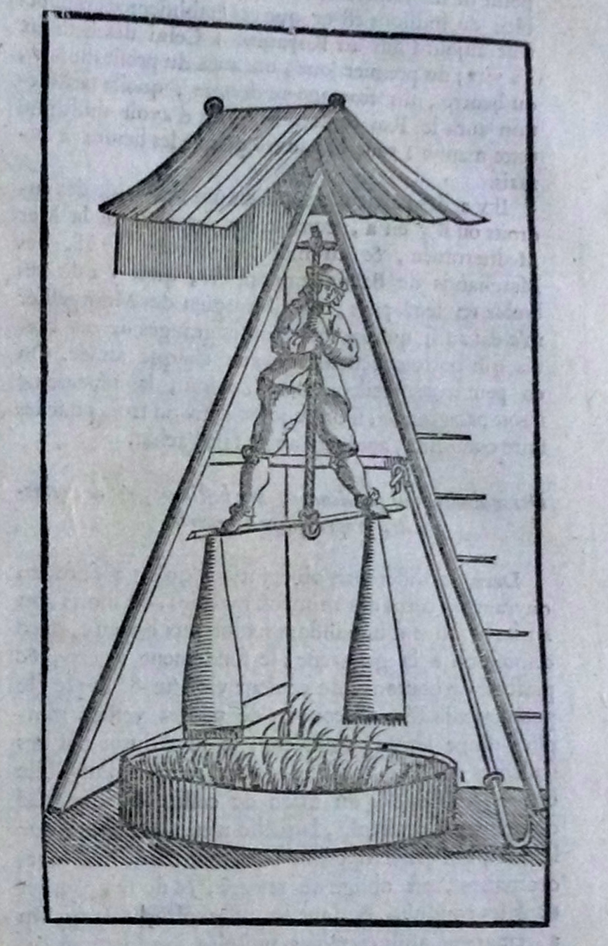 Machine à broyer les navets, inventée par Gabriel Calloet-Kerbrat